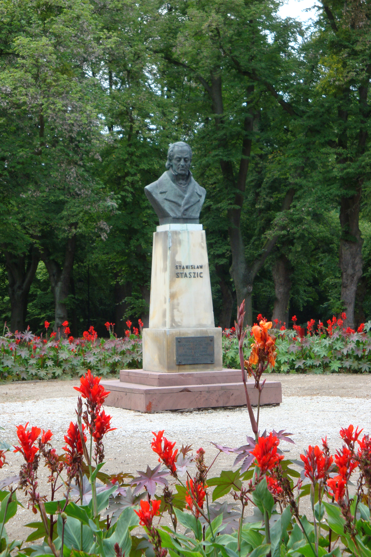 Ciechocinek, Park Tężniowy, 1875, 1930. Popiersie Stanisława Staszica w Parku Tężniowym stan 1 VIII 2013